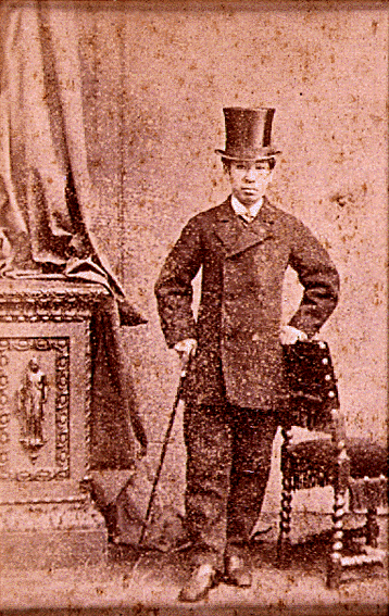 ロンドン留学中の川路寛堂 東京大学史料編纂所蔵